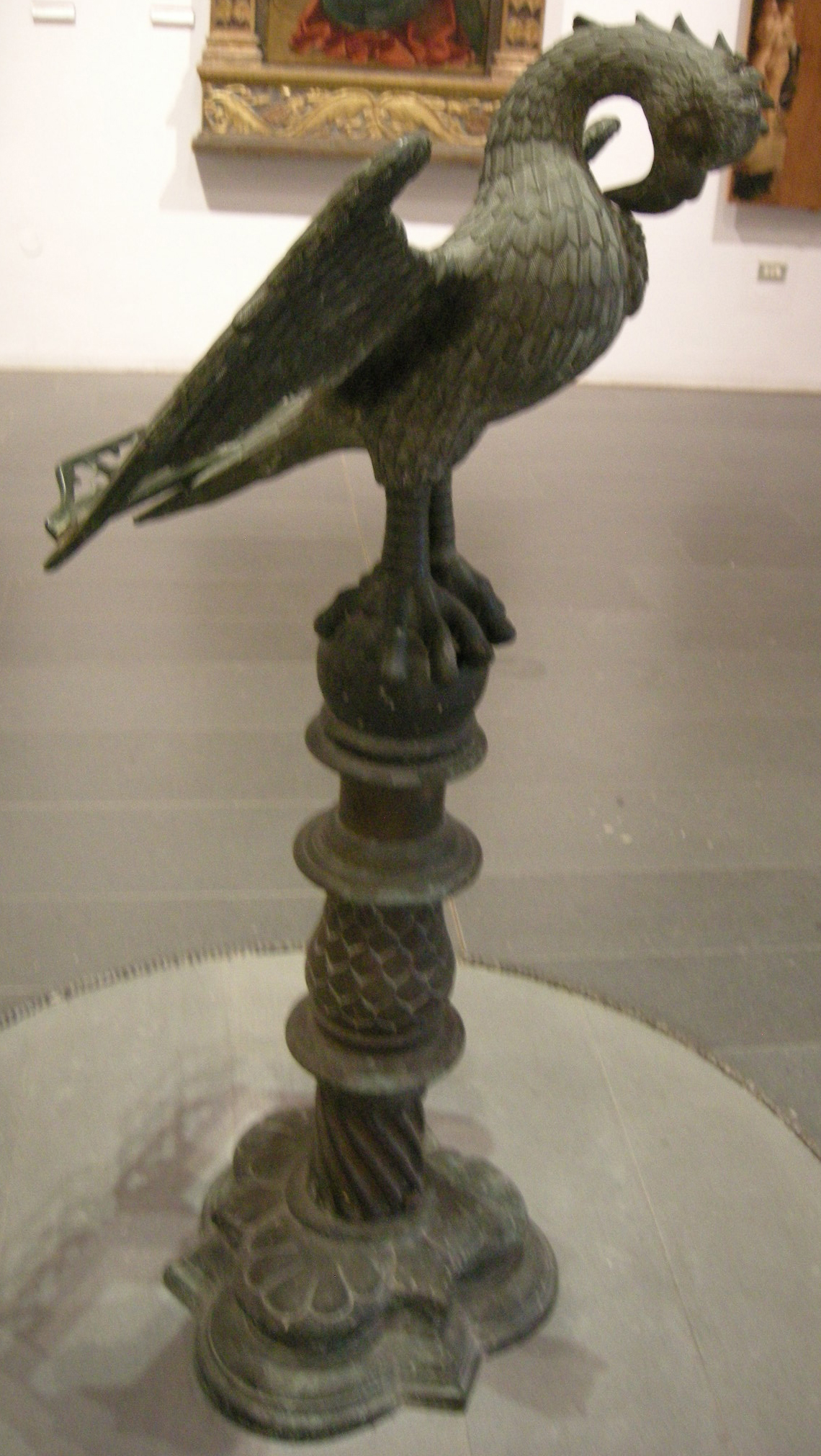 Museo regionale di messina, leggio a forma di pellicano, di scuola renana, xvi sec.